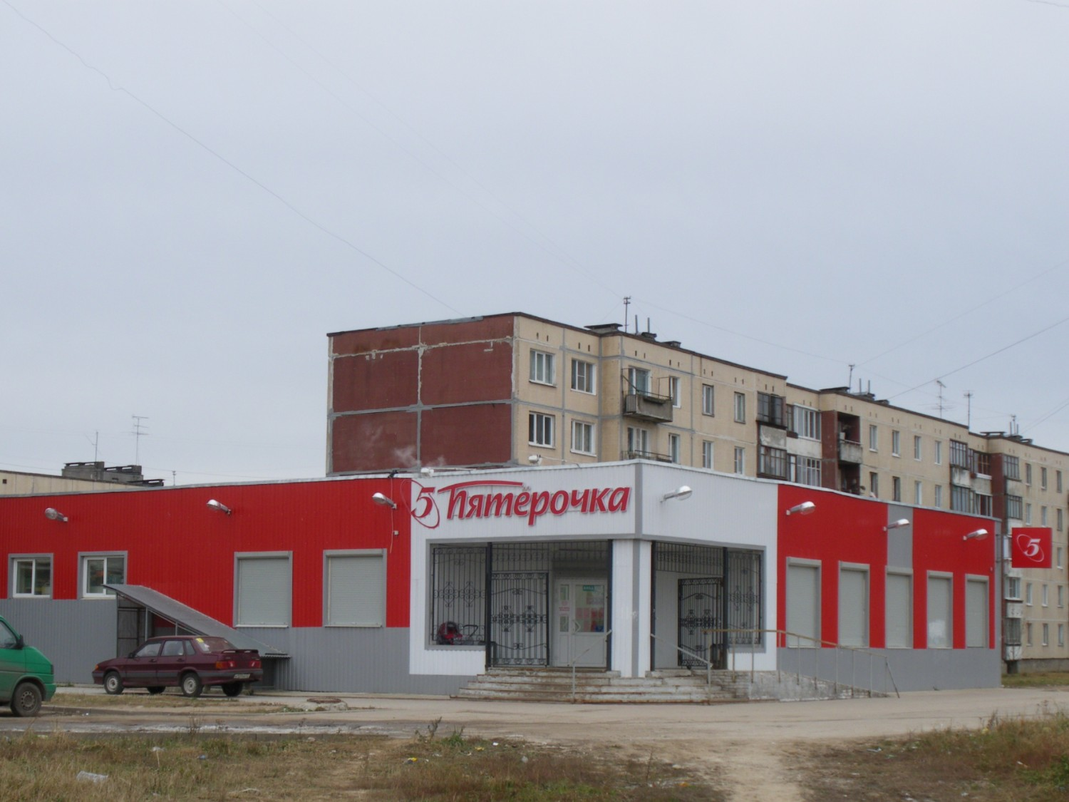 Россия, Ленинградская область, Ломоносовский район, село Русско-Высоцкое, дом 25А, магазин «Пятёрочка» № 912. Дата съёмки - 4 ноября 2009 г. Автор - Роговиков Николай.